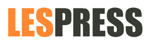 Logo von LESPRSS Homepage